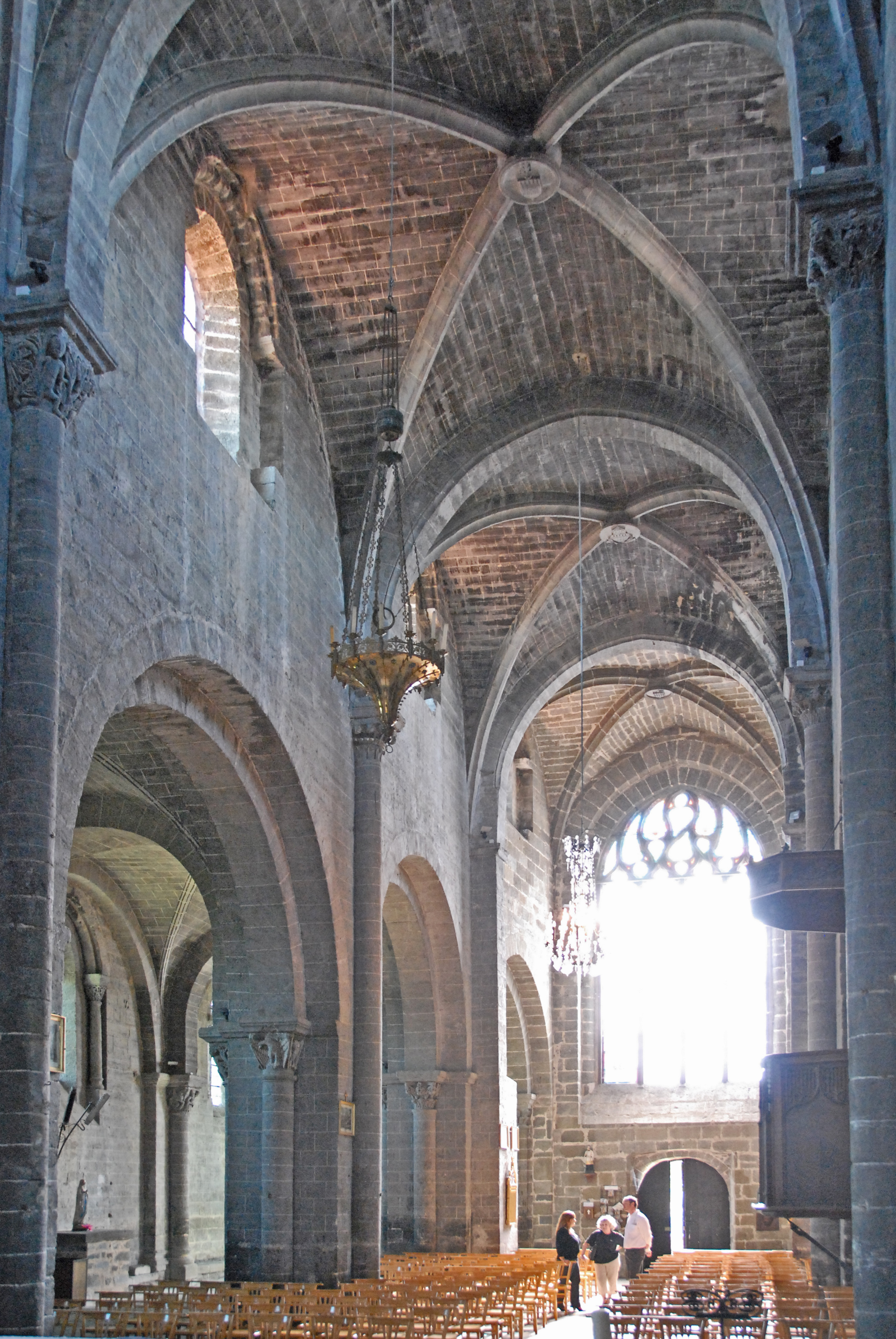 Chanteuges, Kirche, Mittelschiff nach W